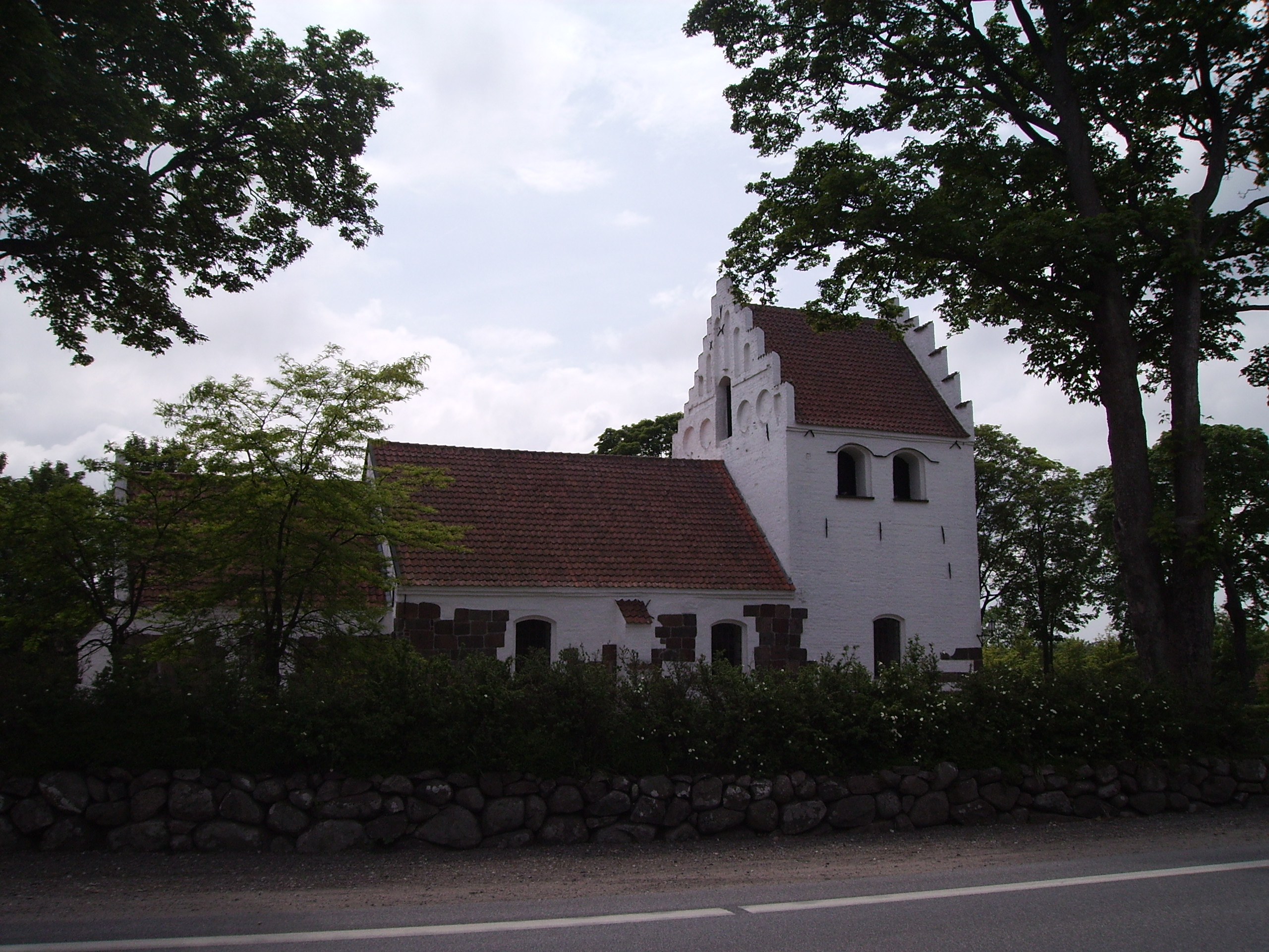 Rolfsted Kirke, Rolfsted Sogn, Åsum Herred, Odense Amt, Denmark (Danish Church) - Rolfsted Kirke fra nord